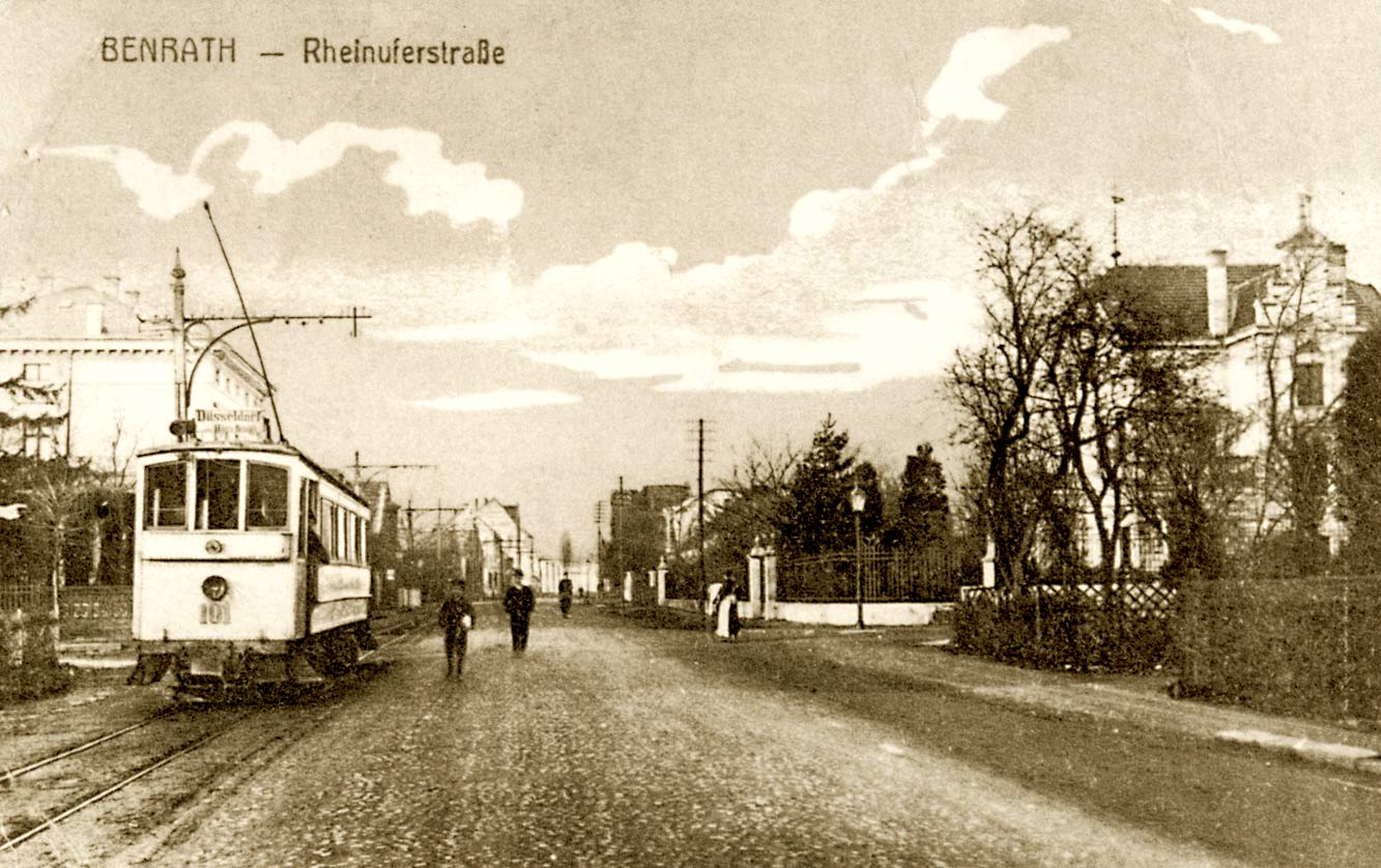 Postkarte "Benrath - Rheinuferstraße", undatiert, nach 1909, mit Triebwagen der Straßenbahnlinie Benrath - Oberbilk (1898 als Teilstrecke des sogenannten "Benrather Netzes" der Actiengesellschaft Bergische Kleinbahnen eröffnet, 1911 von der Stadt Düsseldorf übernommen und an die Rheinische Bahngesellschaft AG - heute Rheinbahn AG verpachtet). Blick in westlicher Richtung in die frühere Düsseldorfer Straße (Provinzialstraße), 1909 umbenannt in Rheinuferstraße (zwischen Benrather Straße/Am Trippelsberg und Kappeler Straße), seit 1929 Bonner Straße bzw. Benrather Schloßallee.